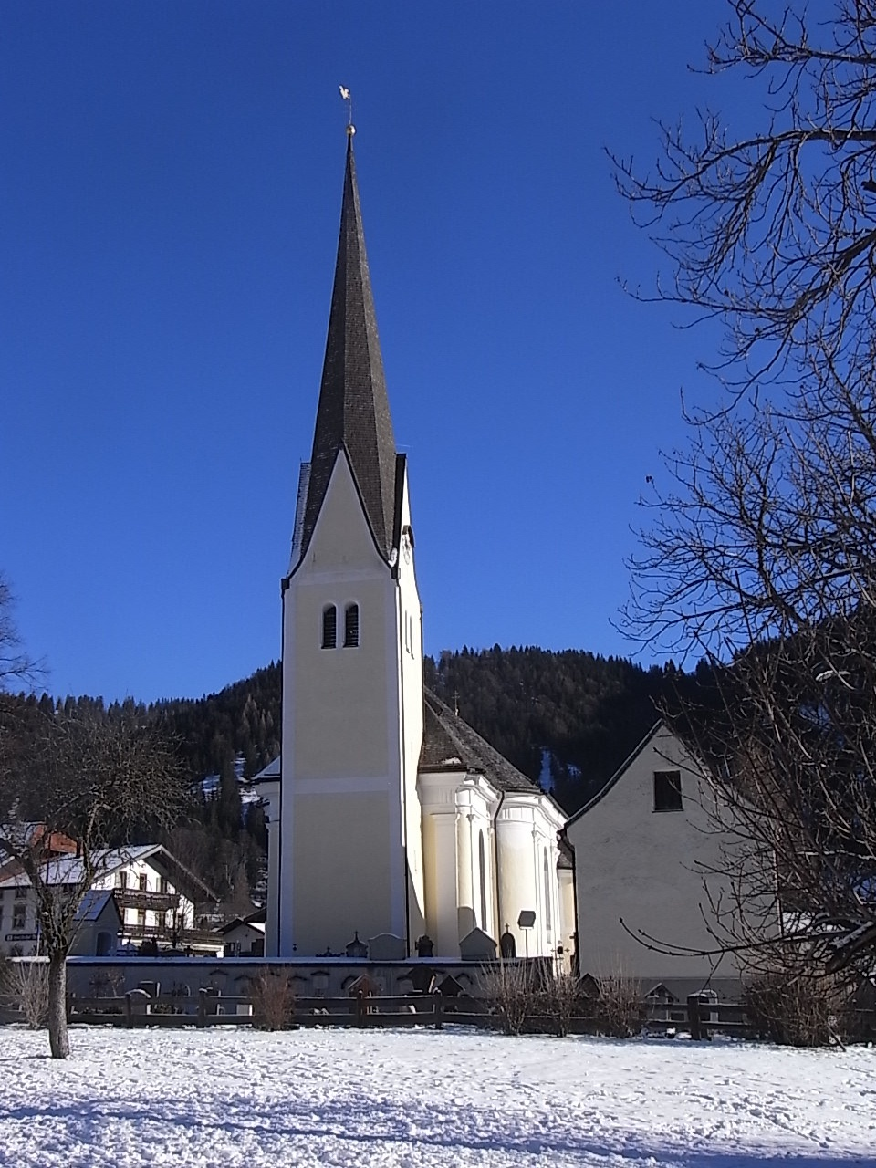 Bayrischzell, Kirche St Margareth